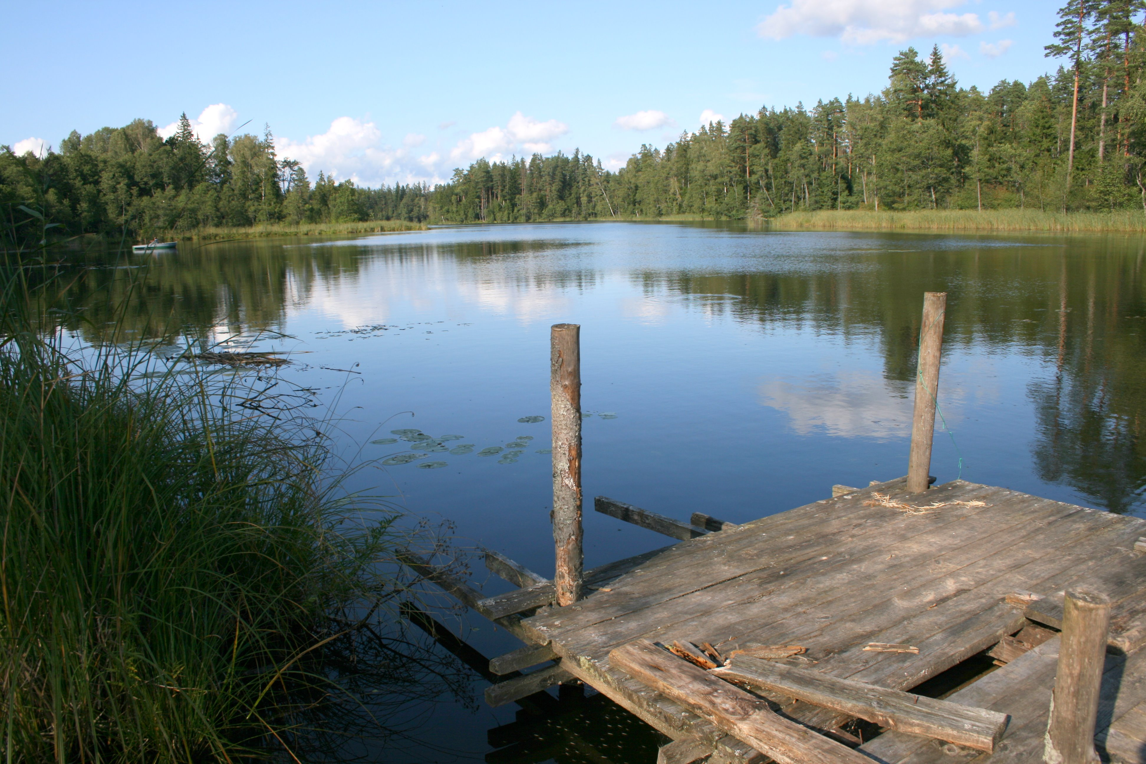 Mežmuižas ezers